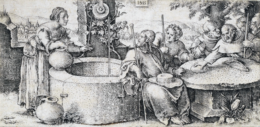 After Franz Timmermann